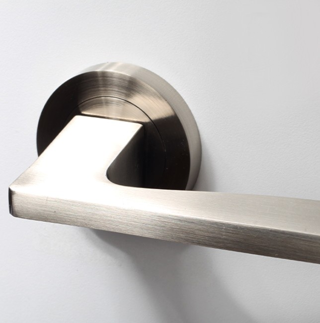 ידית לדלת פנים